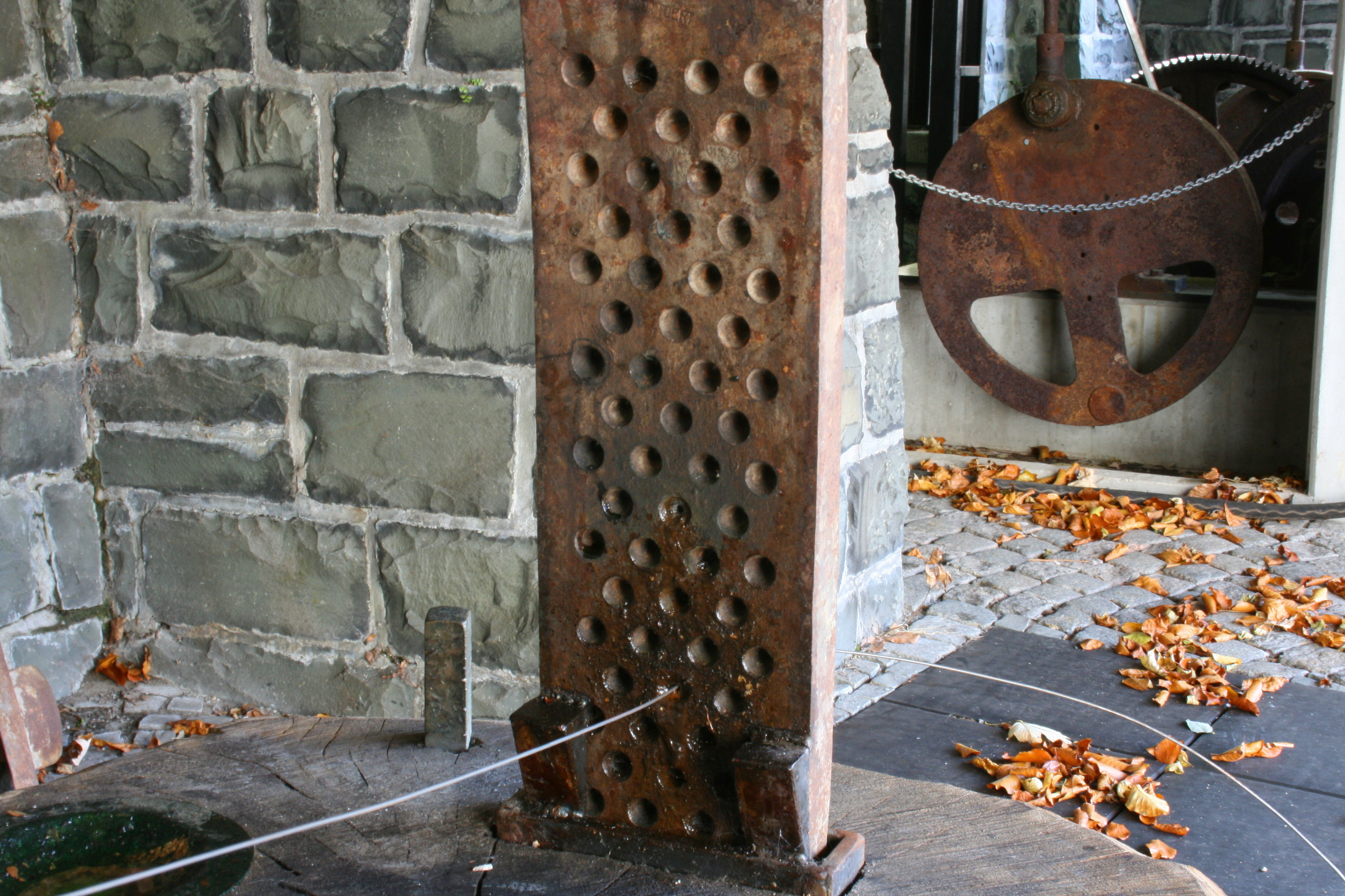 Deutsches Drahtmuseum in Altena